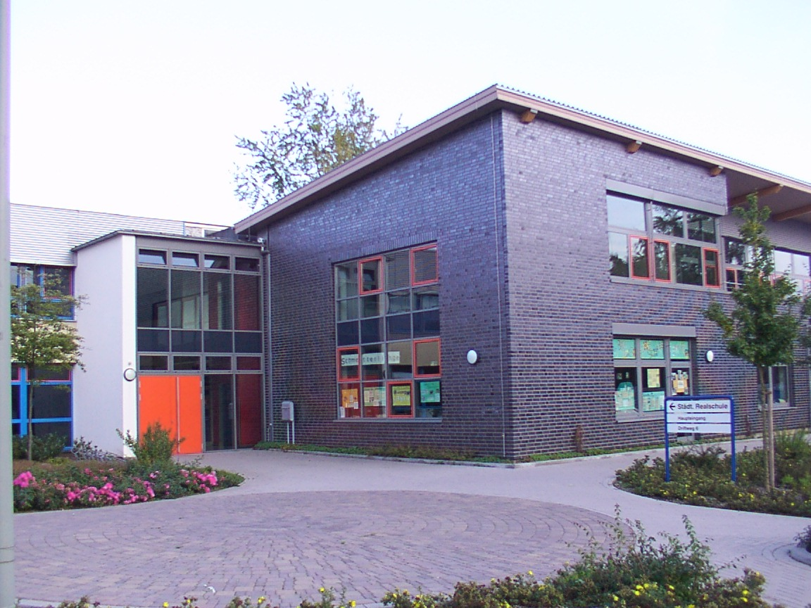 Delbrück: Städtische Realschule, Haupteingang